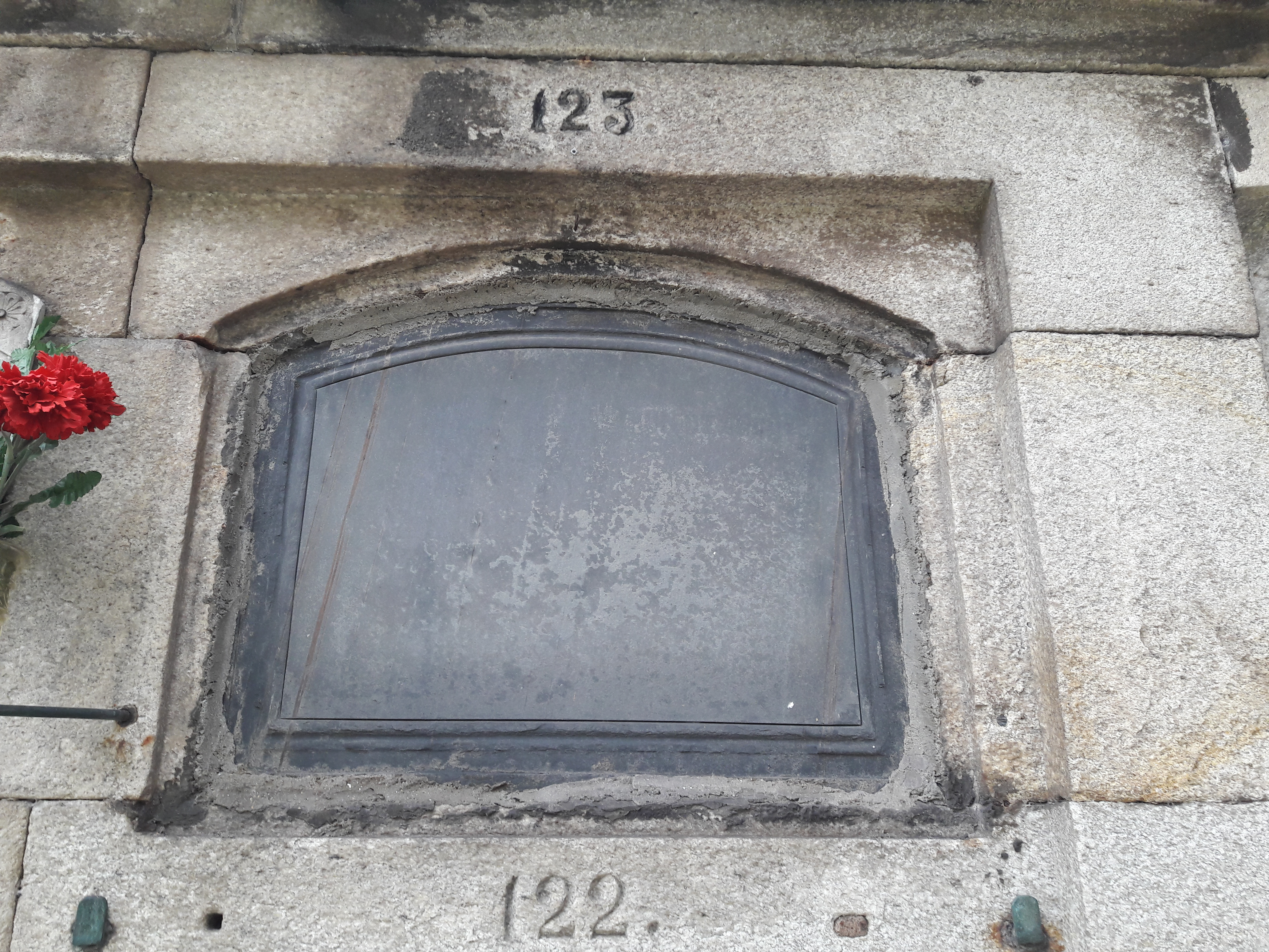 Tumba (coa lápida borrada) de Pedro Ferrer no cemiterio de Santo Amaro da Coruña